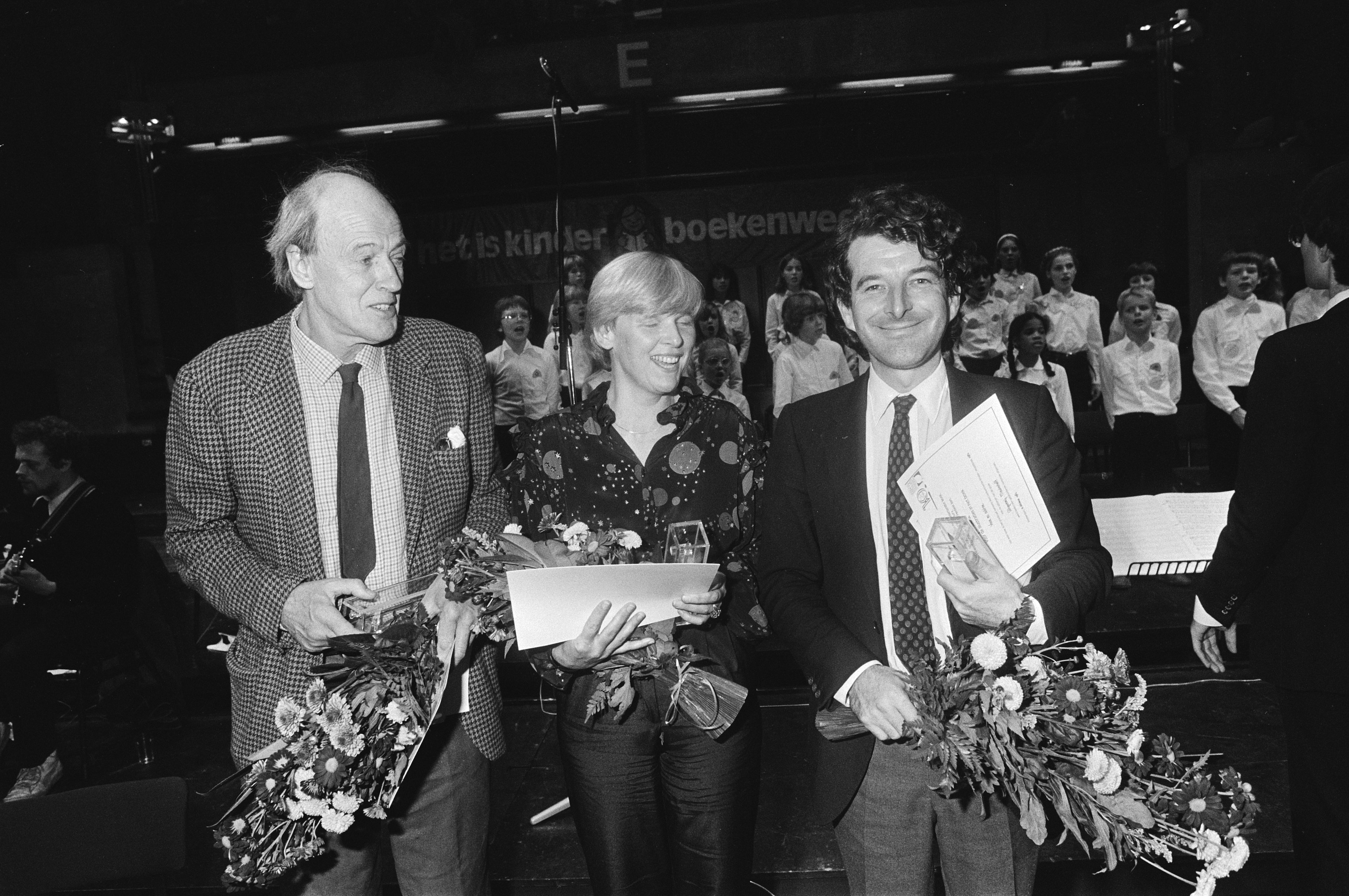 Collectie / Archief : Fotocollectie Anefo Reportage / Serie : Uitreiking van de Gouden Griffel en Penseel in Utrecht Beschrijving : Roald Dahl (Zilveren Griffel), Nannie Kuiper (Gouden Griffel), Joost Roelofz (Gouden penseel) v.l.n.r. Datum : 13 oktober 1982 Locatie : Utrecht (prov), Utrecht (stad) Trefwoorden : illustrators, kinderboeken, prijzen, schrijvers, uitreikingen Persoonsnaam : Dahl, Roald, Kuiper, Nannie, Roelofz, Joost Fotograaf : Dijk, Hans van / Anefo Auteursrechthebbende : Nationaal Archief Materiaalsoort : Negatief (zwart/wit) Nummer archiefinventaris : bekijk toegang 2.24.01.05 Bestanddeelnummer : 932-3622